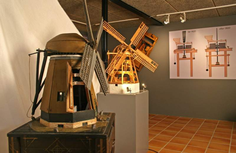 De to modelmøller på Møllehistorisk Samling i Hadsund